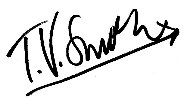 Namenszug laut Autogramm von T. V. Smith